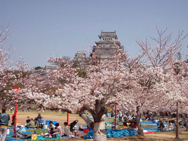 姫路城のお花見、2005年4月投稿者自身による撮影 Hanami at Himeji Castle in Himeji, Hyogo prefecture, Japan